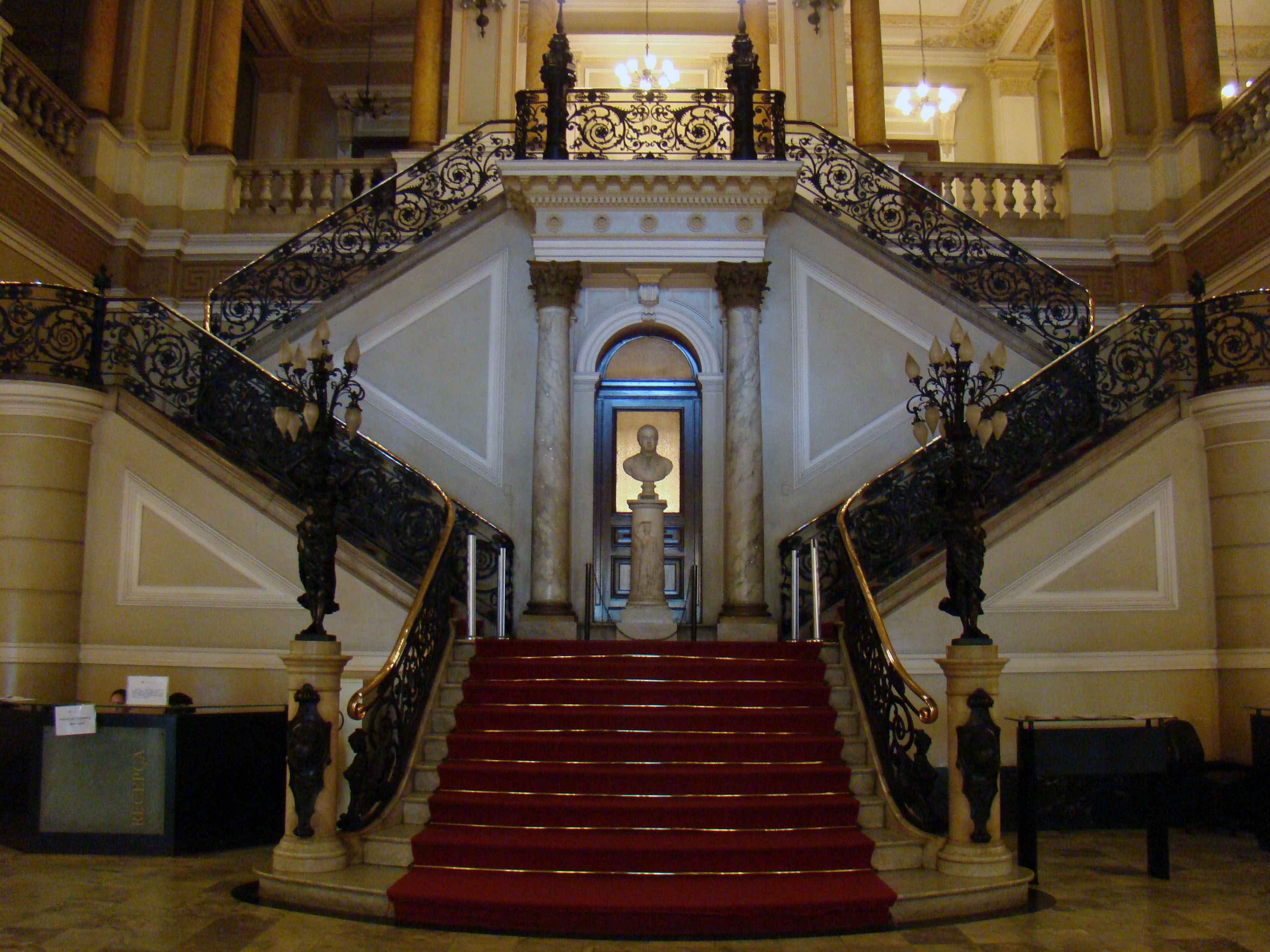 Biblioteca Nacional do Brasil, Rio de Janeiro, Brasil.